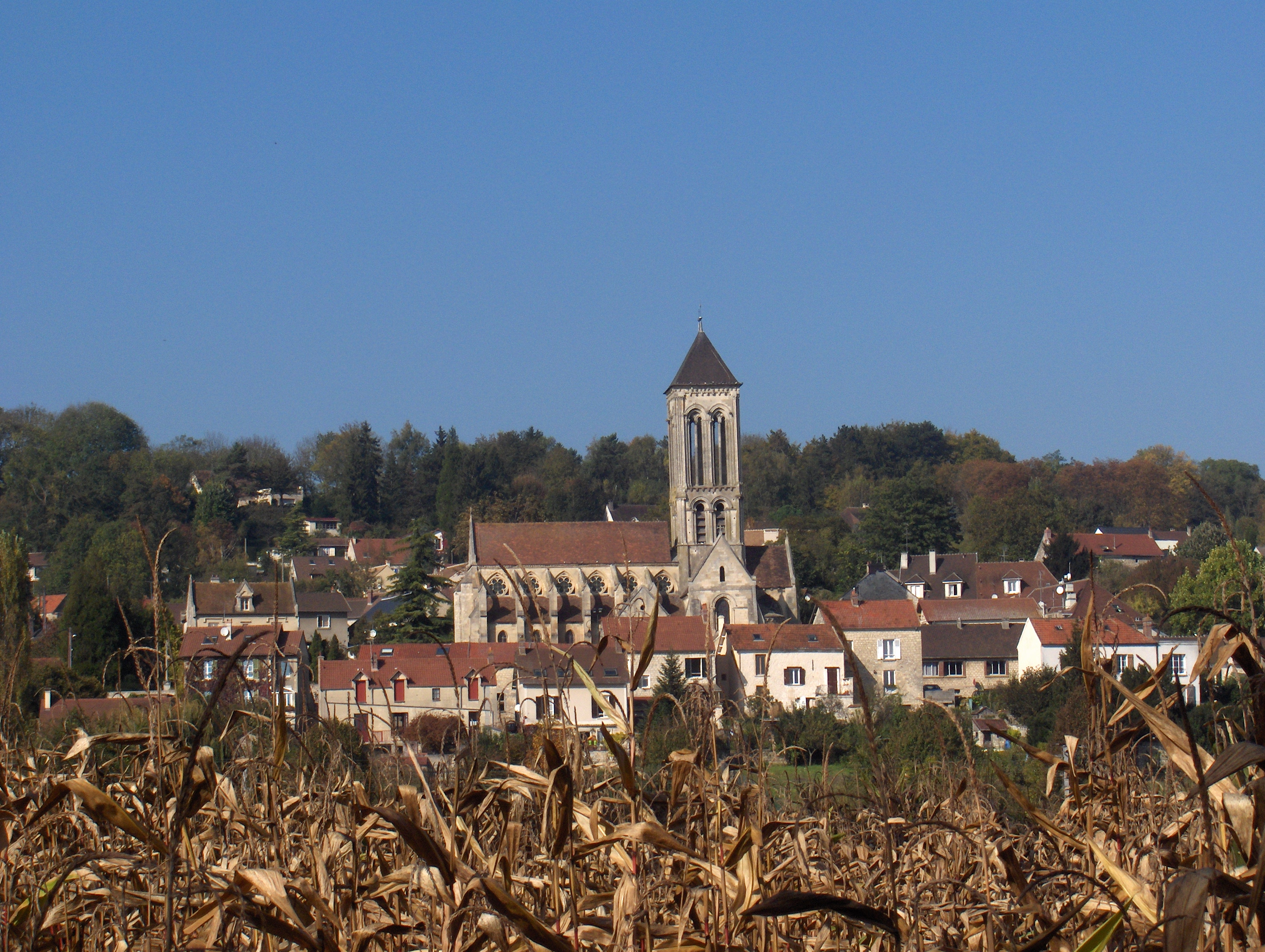 Église Notre Dame de l'Assomption à Champagne-sur-Oise vue de puis les rives de l'Oise